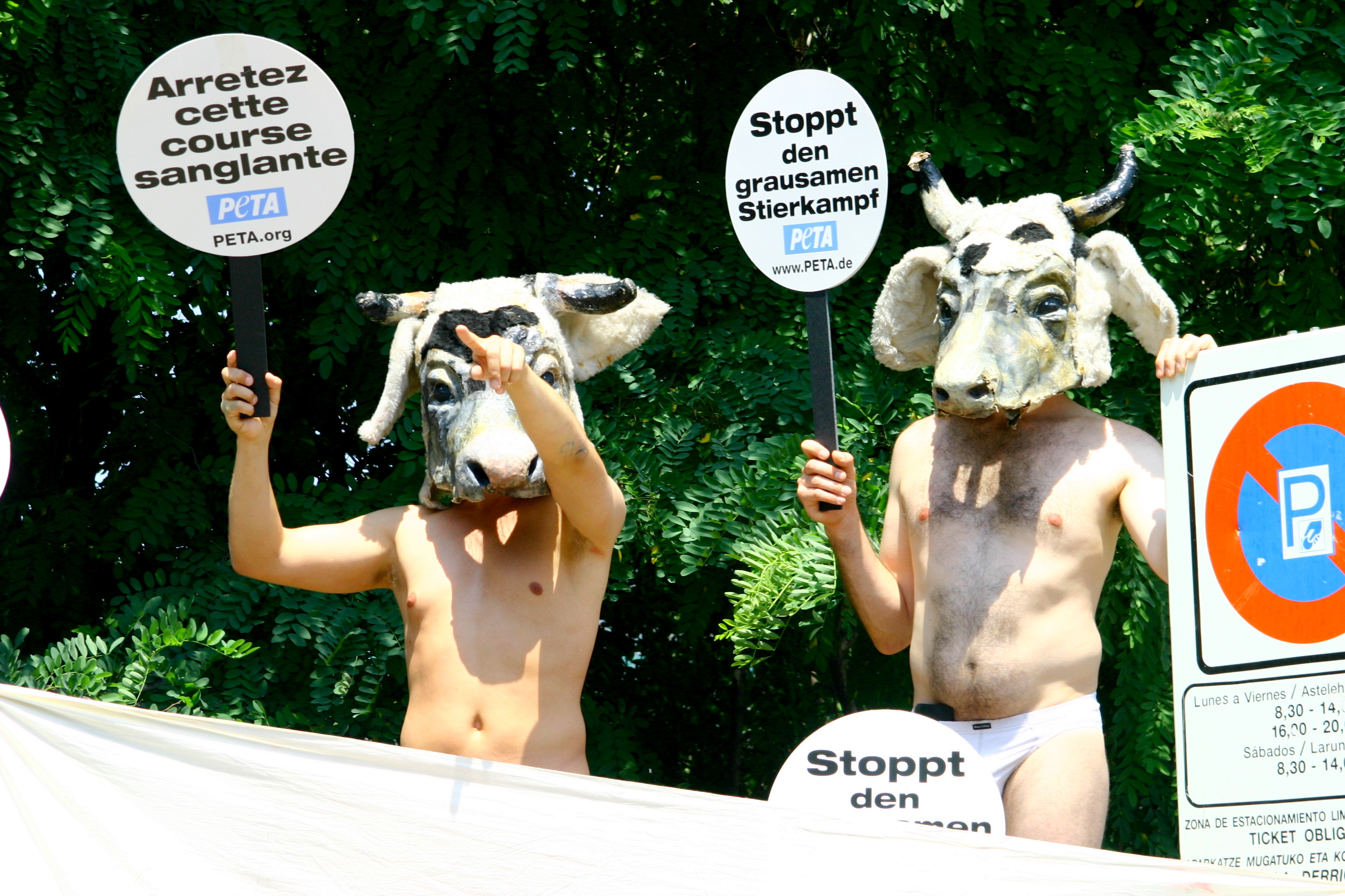 Manifestación antitaurina en Pamplona, España.